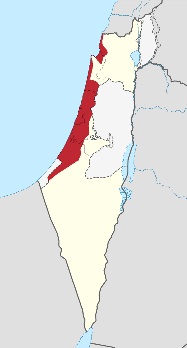 Israeli Coastal Plain region